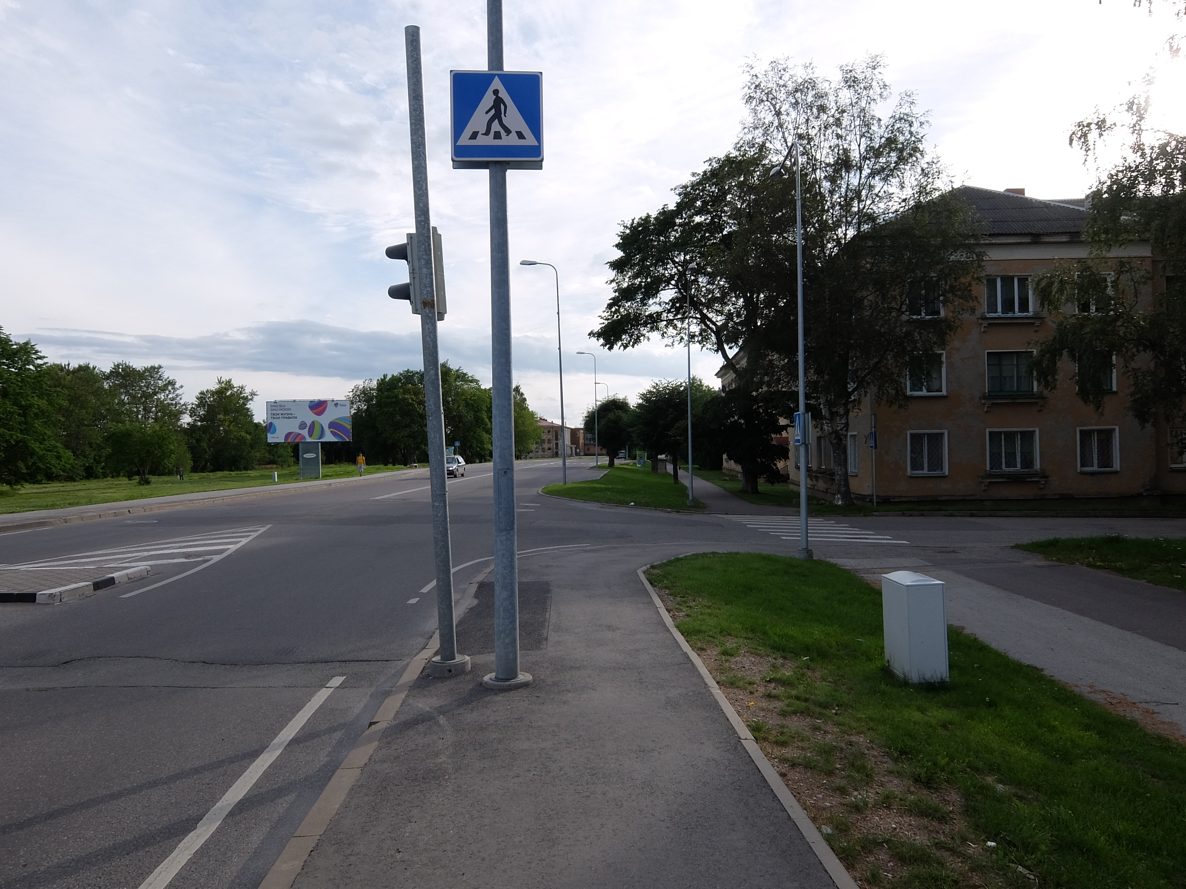 Järveküla tee Kohtla-Järvel. Eemalt paistab Kohtla-Järve Spordikeskus